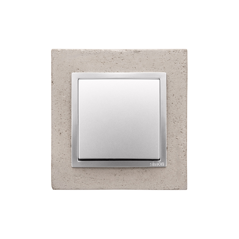 Łącznik jednobiegunowy w ramce betonowej serii Simon 54 Nature. Nazwa producenta: KONTAKT - SIMON Spółka Akcyjna.